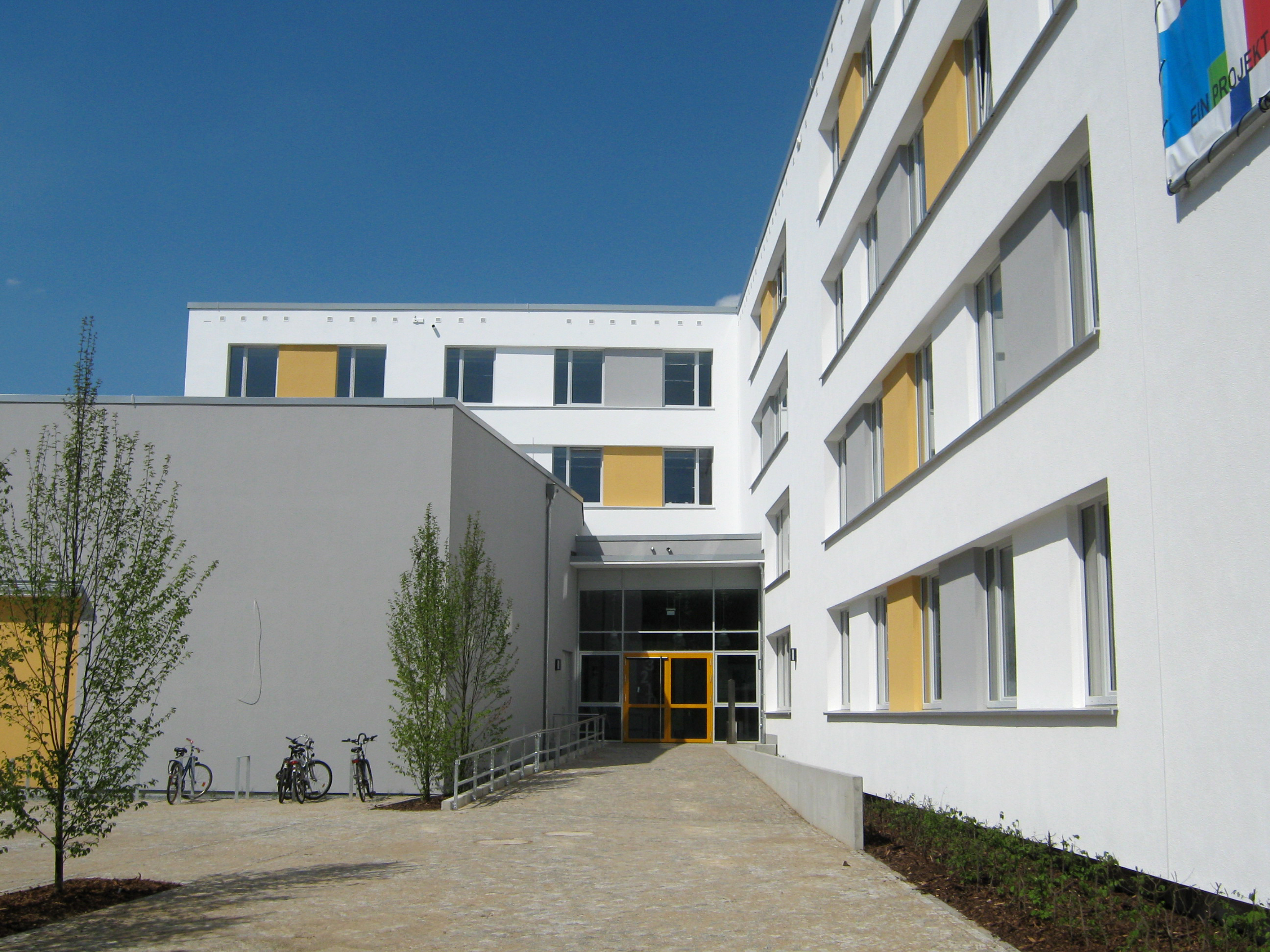 Frieda 23 in Rostock mit dem Eingang an der Ecke Friedrichstraße/Patriotischer Weg